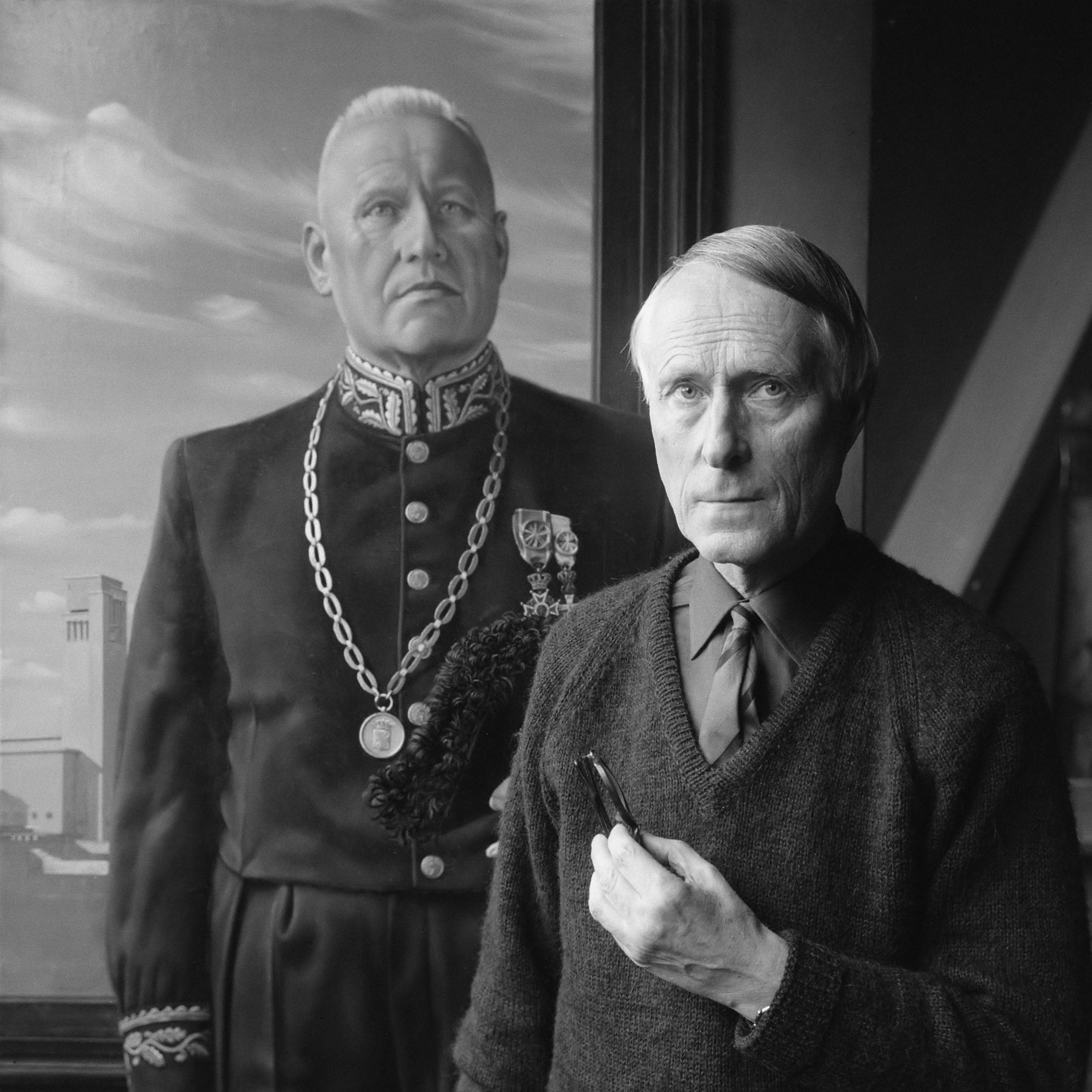 Schilder Carel Willink voor het schilderij dat hij maakte van burgemeester Joost Johannes Gerardus Boot van Hilversum 10 november 1966